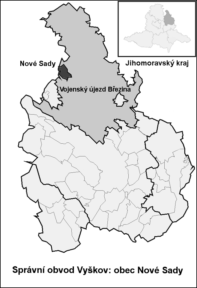 Hranice Nové_Sady (Vyškov- czech republic)